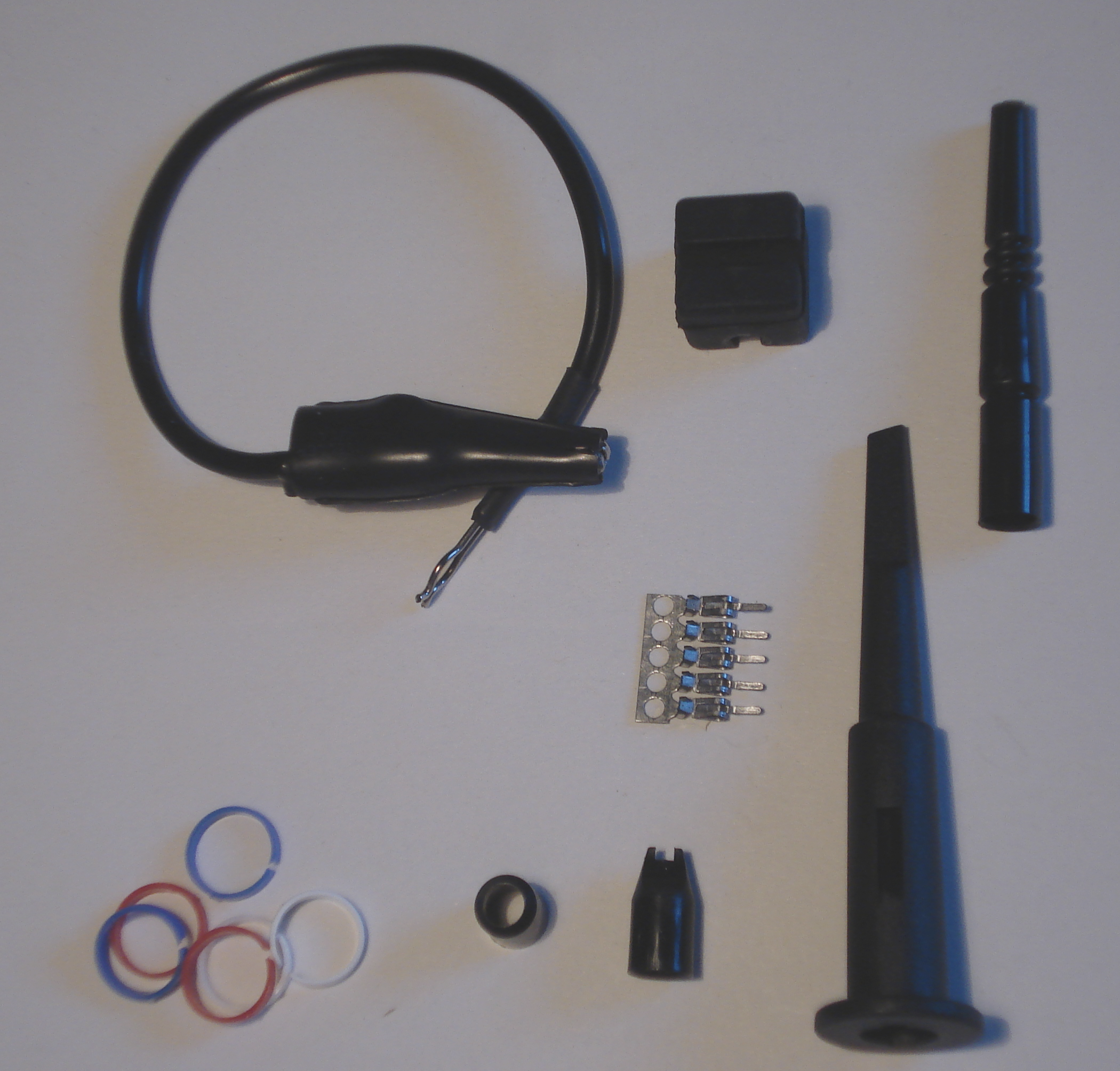 Zubehör eines älteren Tastkopfes. Die dargestellten Zubehörelemente sind möglicherweise nicht mehr aktuell. Dieses Zubehör stammt von einem Tastkopf von circa 1985.